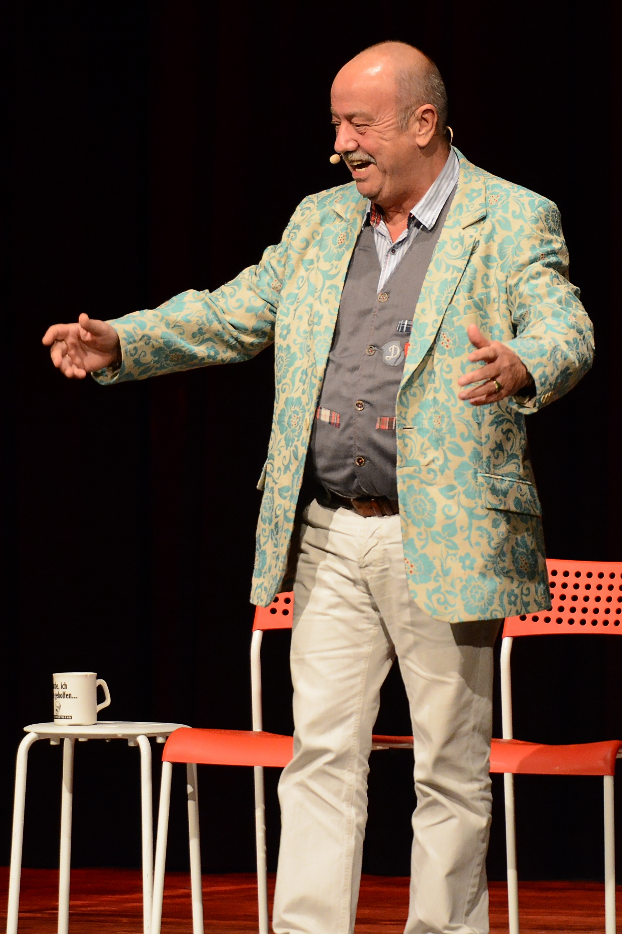 Ludger Stratmann 2014 in Kamp-Lintfort.